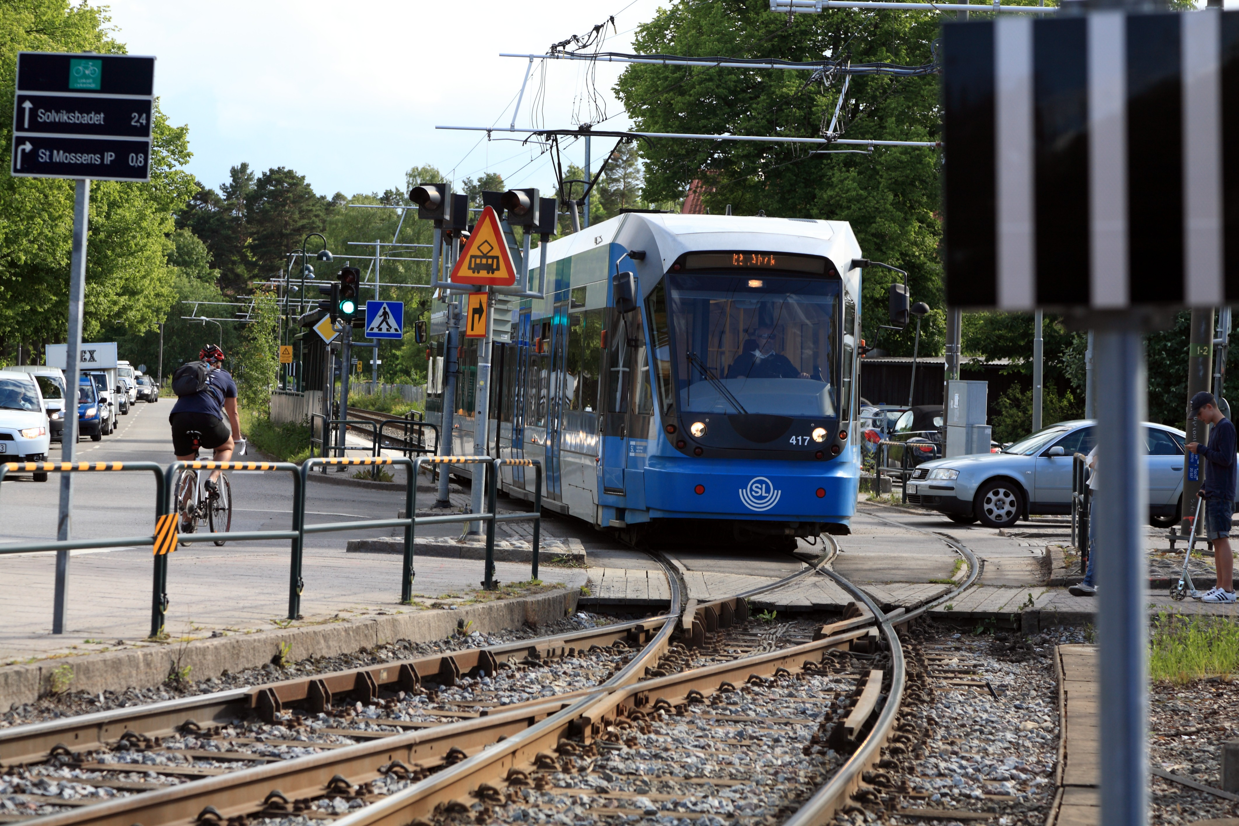 Zug nach Alvik vor dem Übergang in den Linksfahrbetrieb. Dieser musste beibehalten werden, um in Alvik in den Hauptlastrichtungen von und nach dem Stadtzentrum von Stockholm kurze Umsteigewege von und zur U-Bahn bieten zu können.